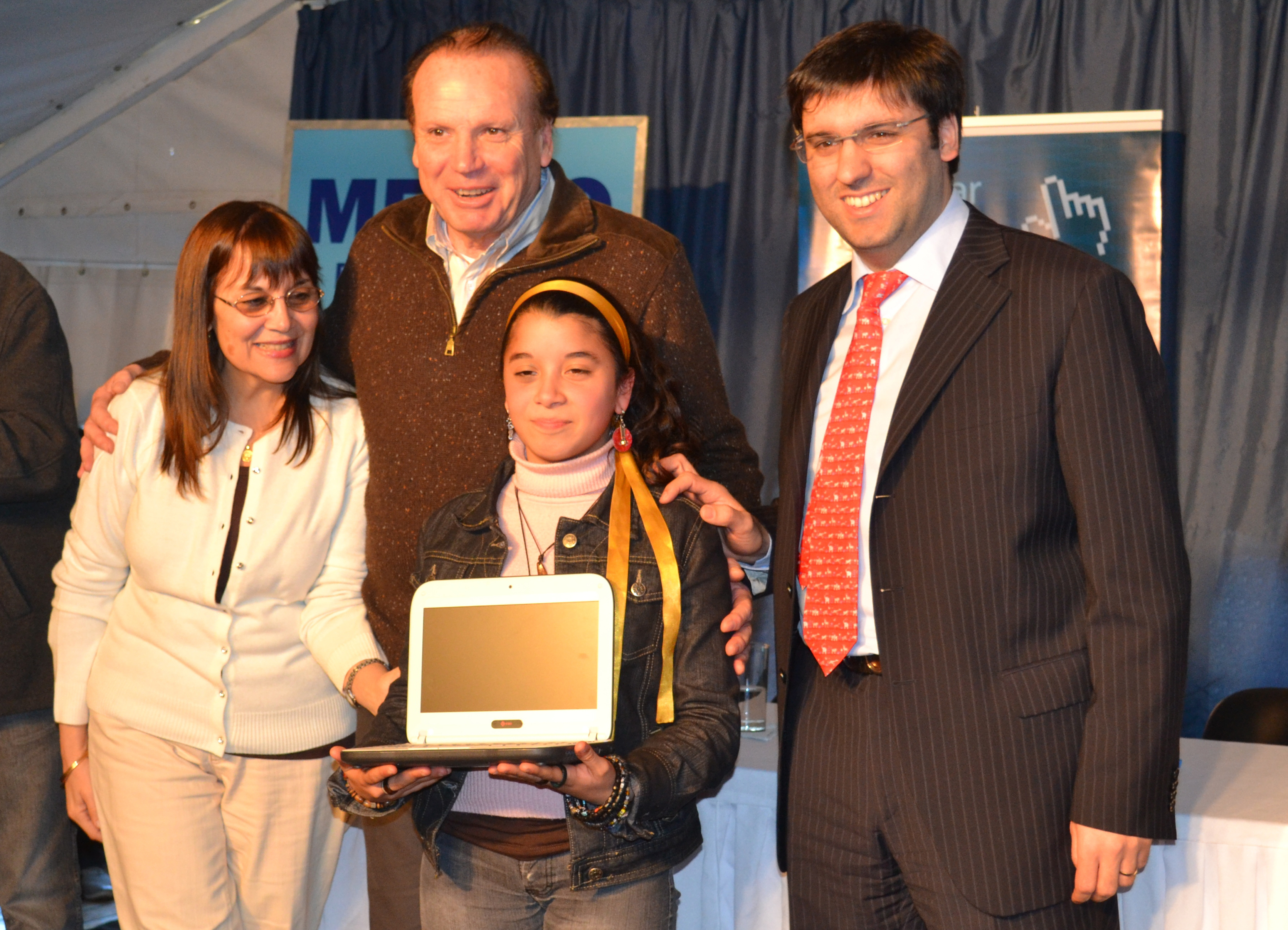 Entrega en Merlo de netbooks